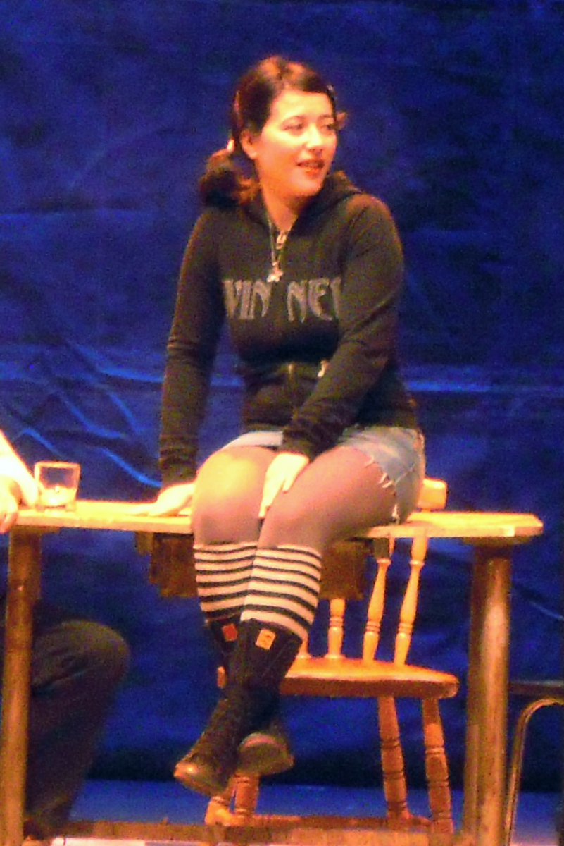 María Lado na obra de teatro "Oeste solitario", no Pazo da Cultura de Pontevedra